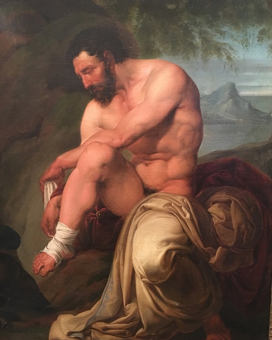 Filottete ferito, olio su tela, collezione privata, Venezia